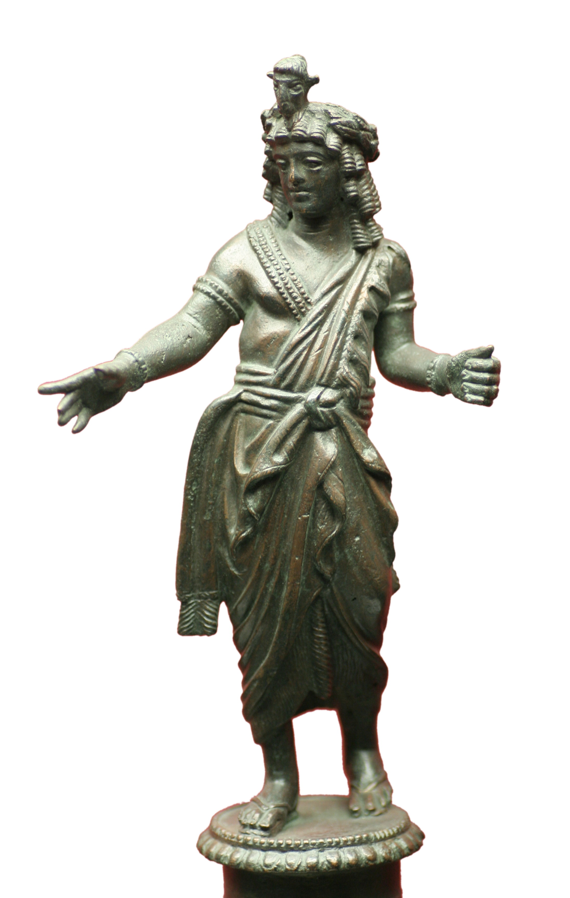 Bronzestatuette eines Priesters des Bocksgottes von Mendes Unterägypten. Römisch 1. Jhdt., Antikensammlung München